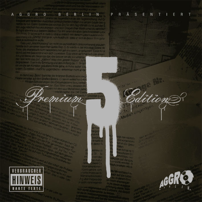 Cover des Samplers „Aggro Ansage Nr. 5“ (Pappschuber der Premium Edition)